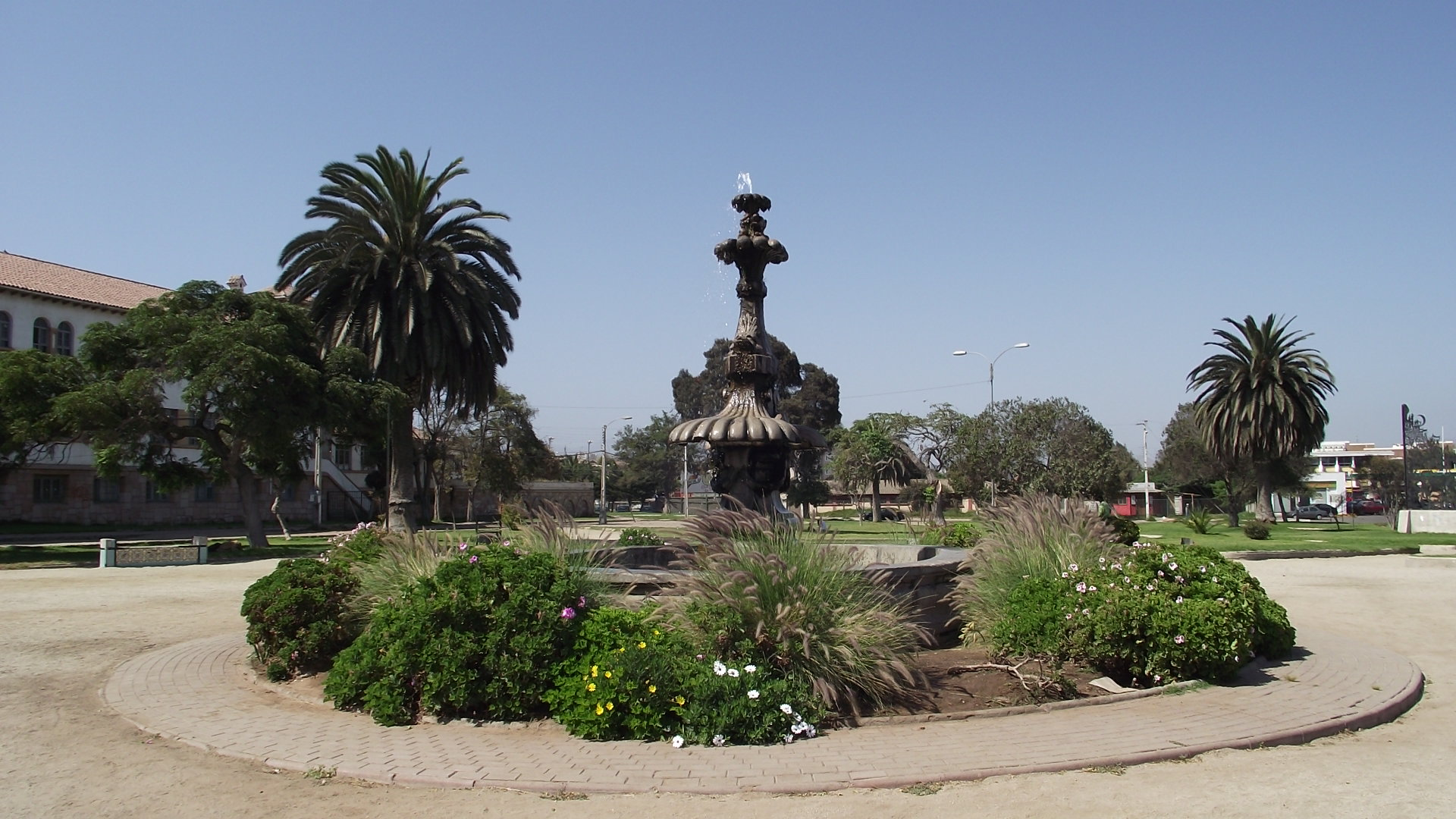 Pileta de la Plaza España